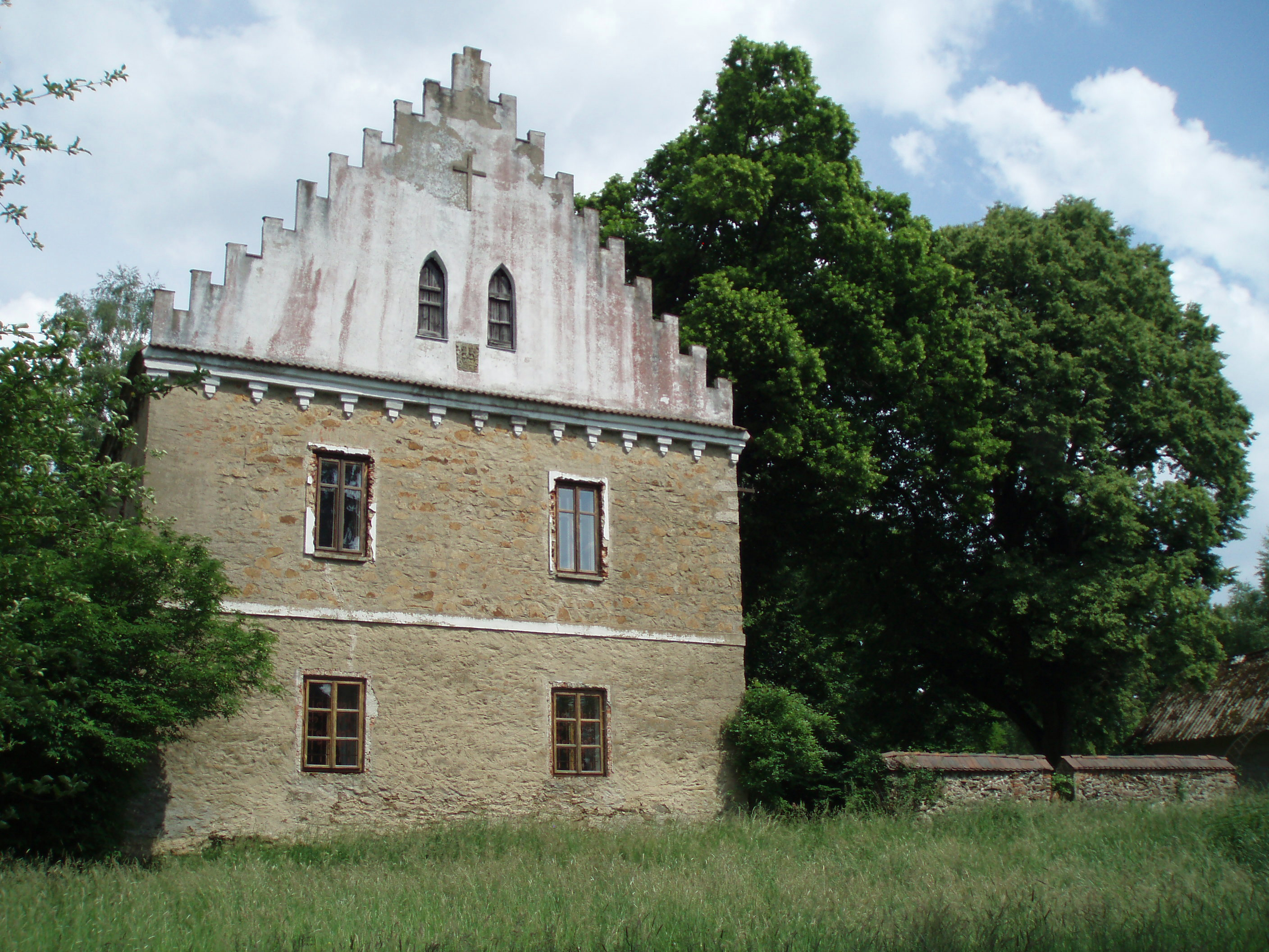 Komárov